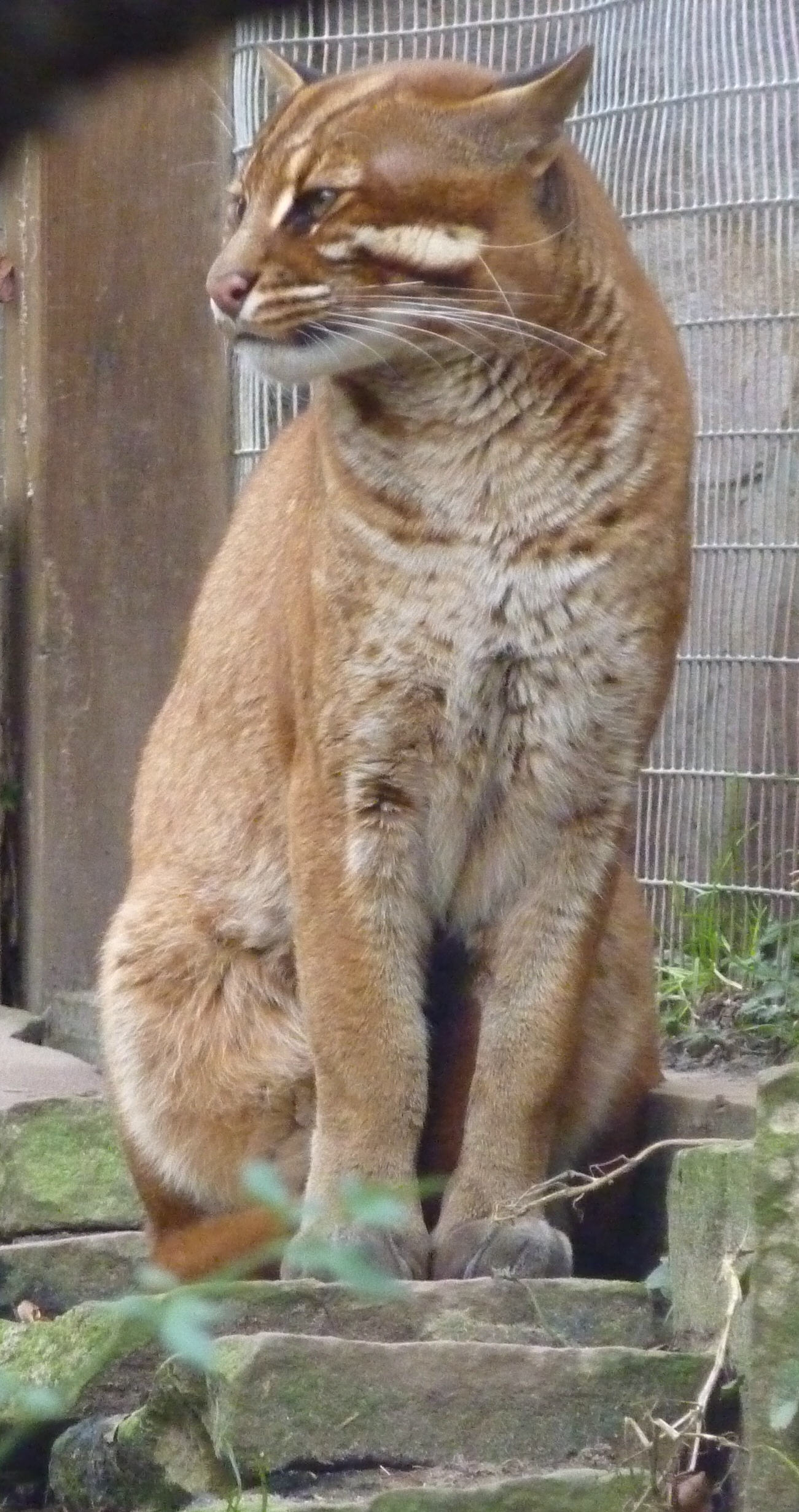 Asiatische Goldkatze im Heidelberger Zoo